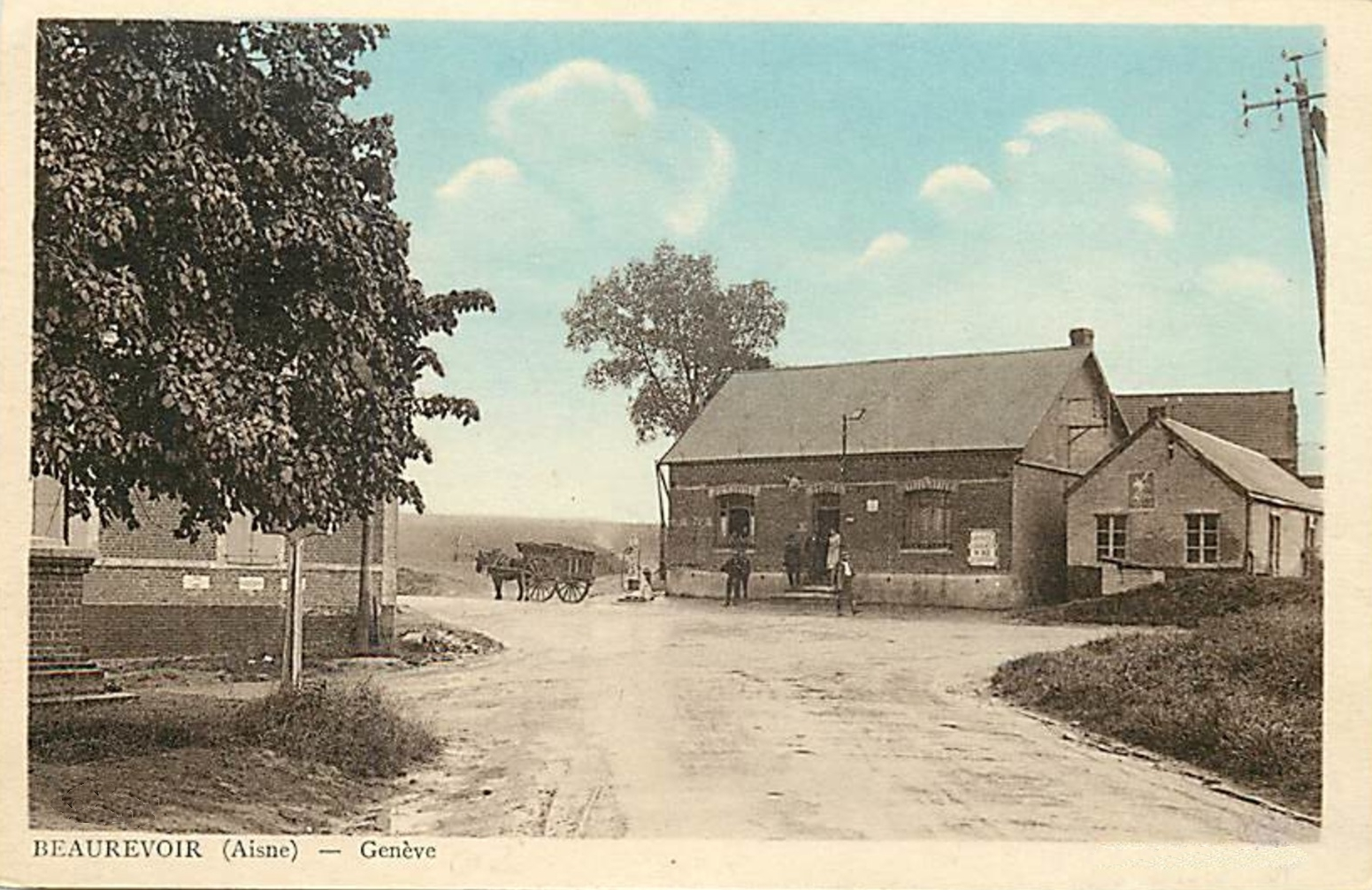 Le hameau de Genève à Beaurevoir.